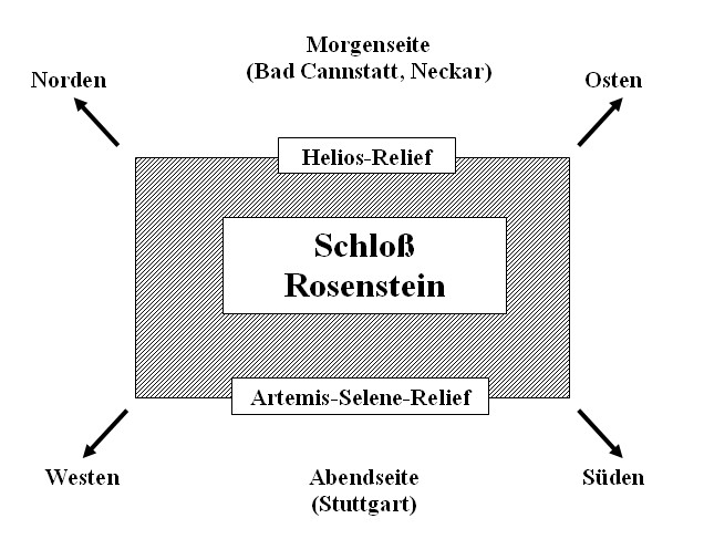 Stuttgart, Schloss Rosenstein, Lageplan des Artemis-Selene-Reliefs und des Helios-Reliefs